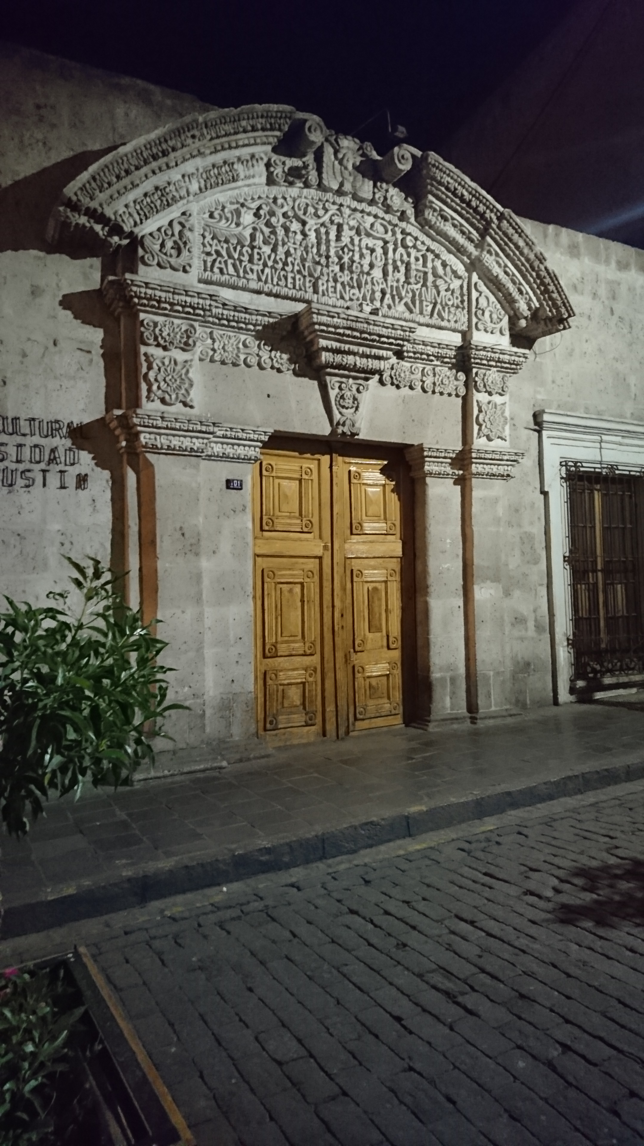 El complejo cultural, anteriormente llamado Casa de Chaves de la Rosa. Actualmente es visitado para exposiciones.